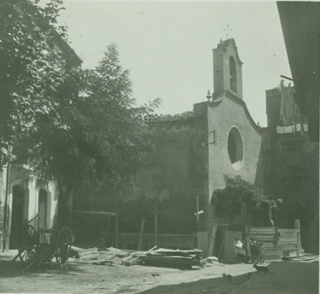 Església de Sant Salvador de Balaguer abans del seu enderrocament.